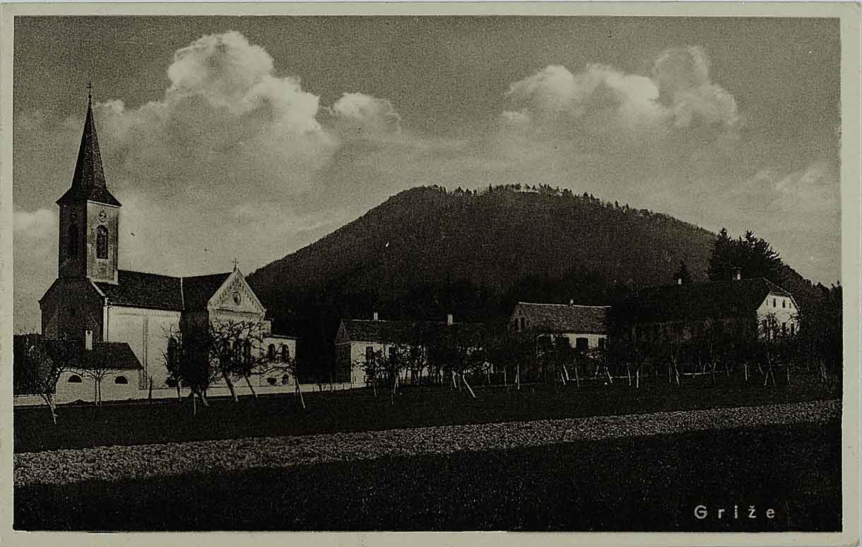 Razglednica Griž pri Žalcu.